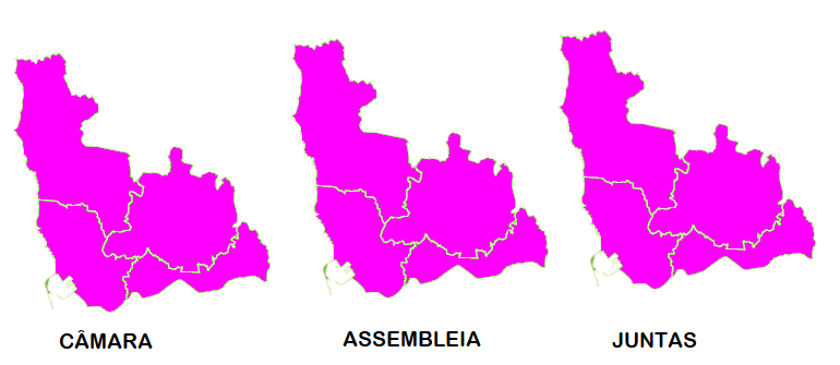 Mapa ilustrativo do partido mais votado por freguesia em Matosinhos (2017)